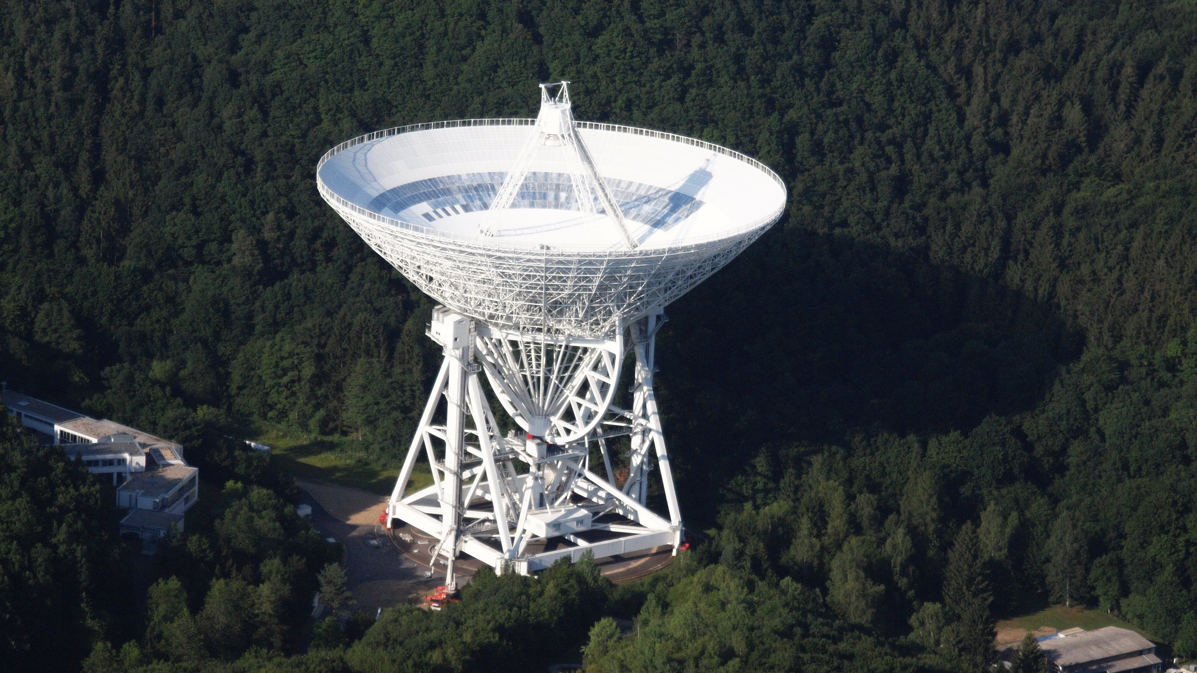 Radioteleskop Effelsberg, Luftaufnahme (2015)